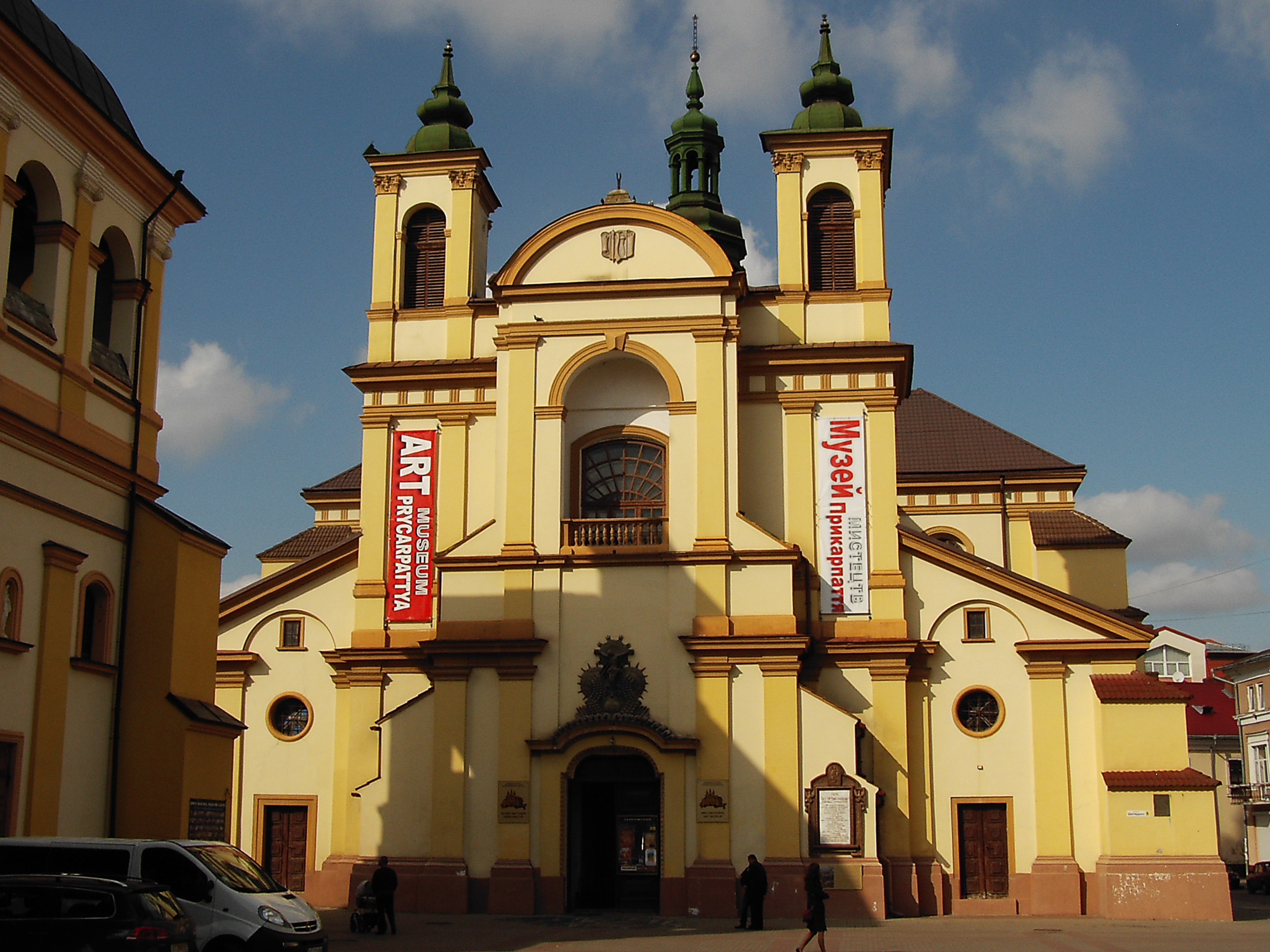 Музей Мистецтва Прикарпаття. м. Івано-Франківськ-3